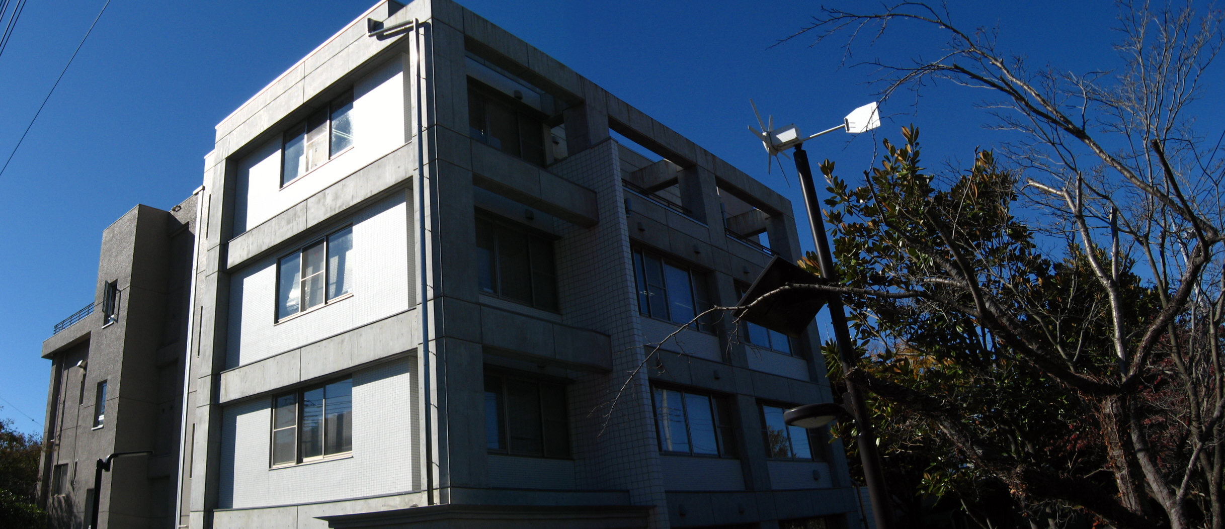 Yamanashi_univ_Crea-Center.jpg